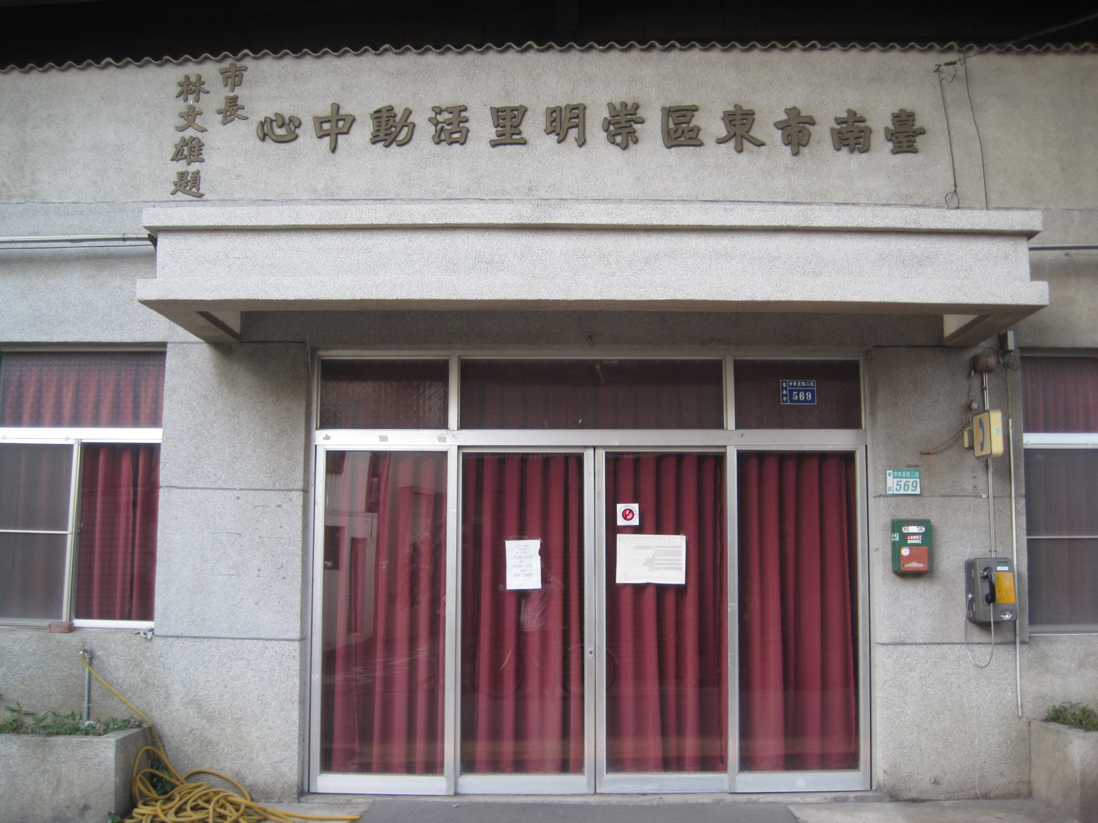 臺南市東區崇明里活動中心